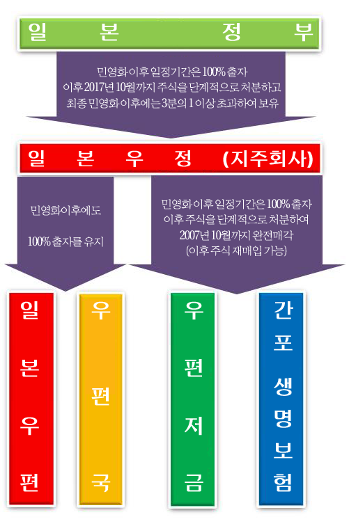 File:Japan_Post_Group_and_Privatization.jpg를 국문판으로 개작, 업로드일자와 제작일자 동일, 만든이 사용자 천어, 일본어판 원작자 User:Genppy